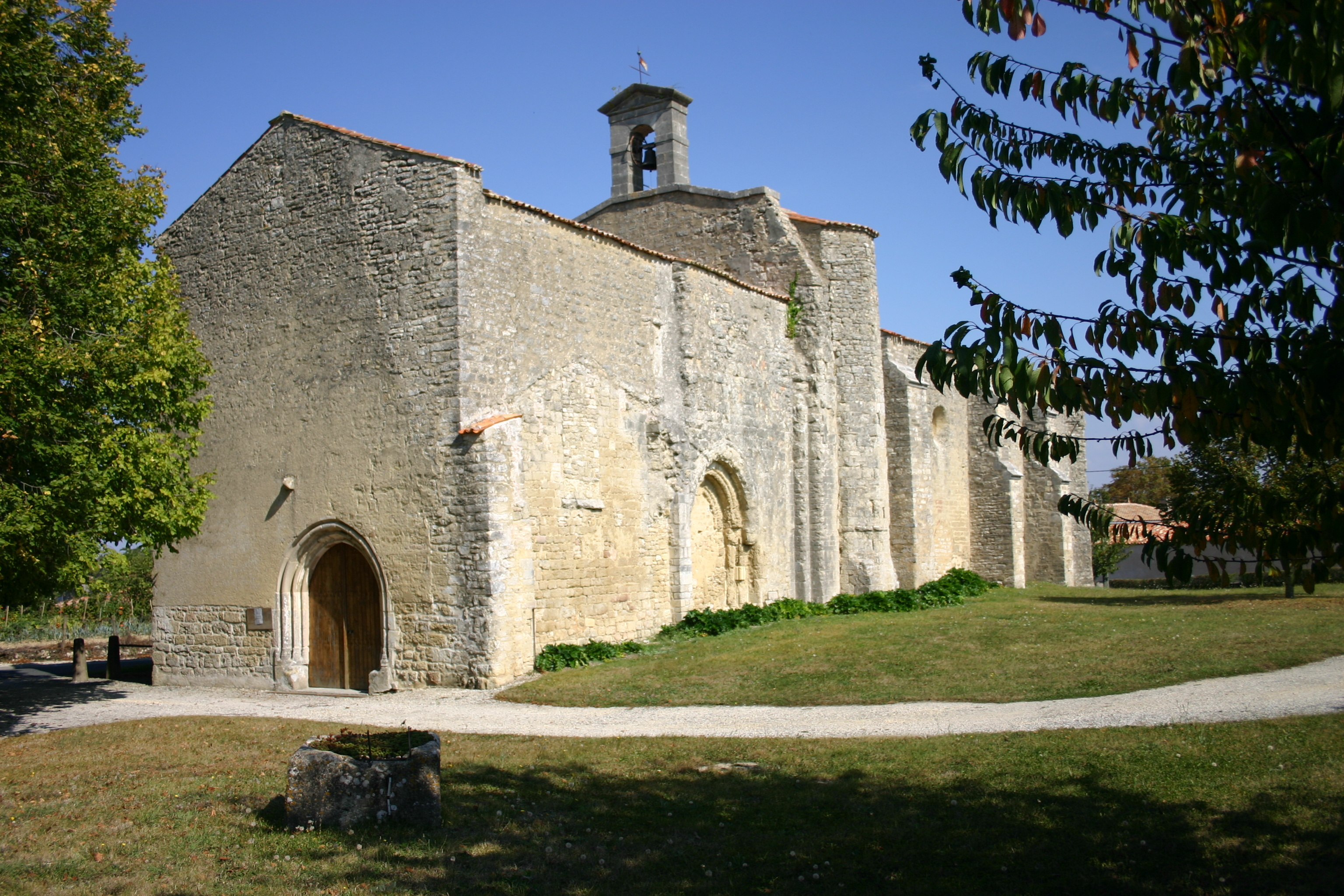 Église de Saint-Félix (Charente-Maritime)